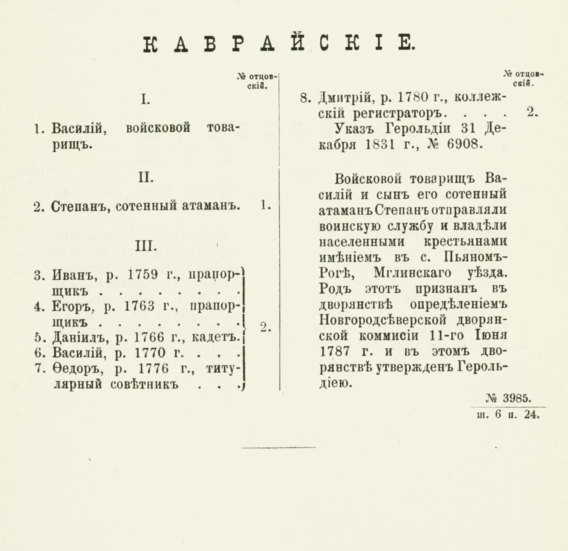 Выписка из Дворянской родословной книги Черниговской губернии